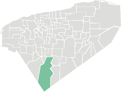 locatie van de gemeente Tekax in Yucatán